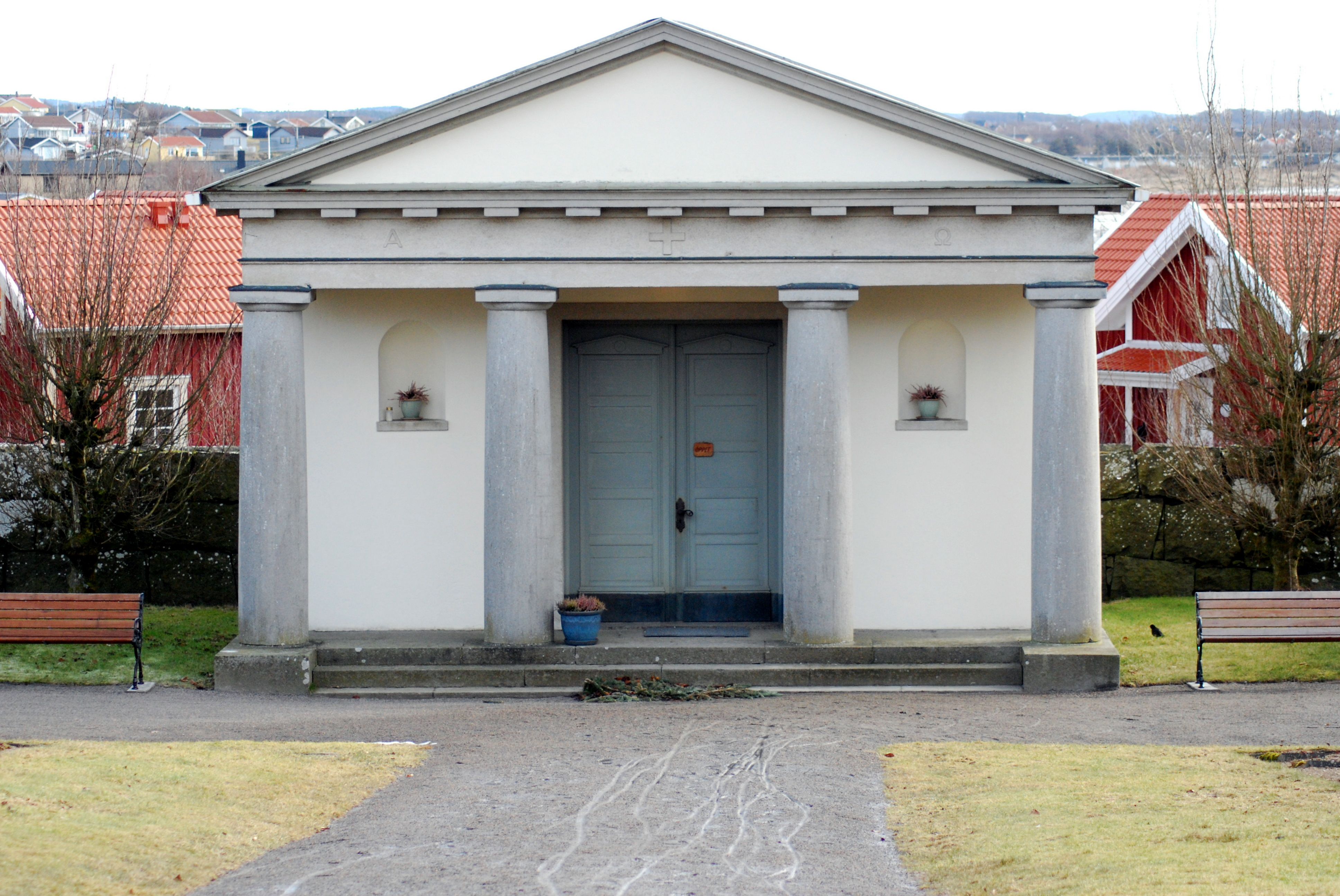 Kapellet på Apelvikens kyrkogård, Varberg.